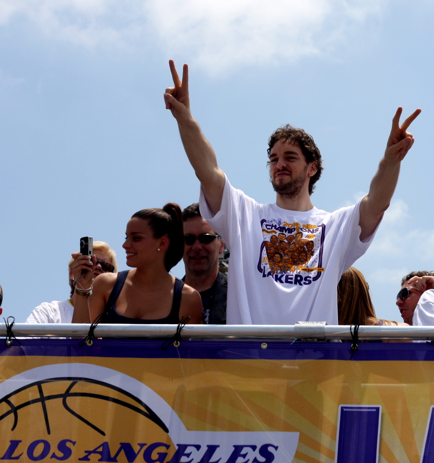 Lakers parade (69)